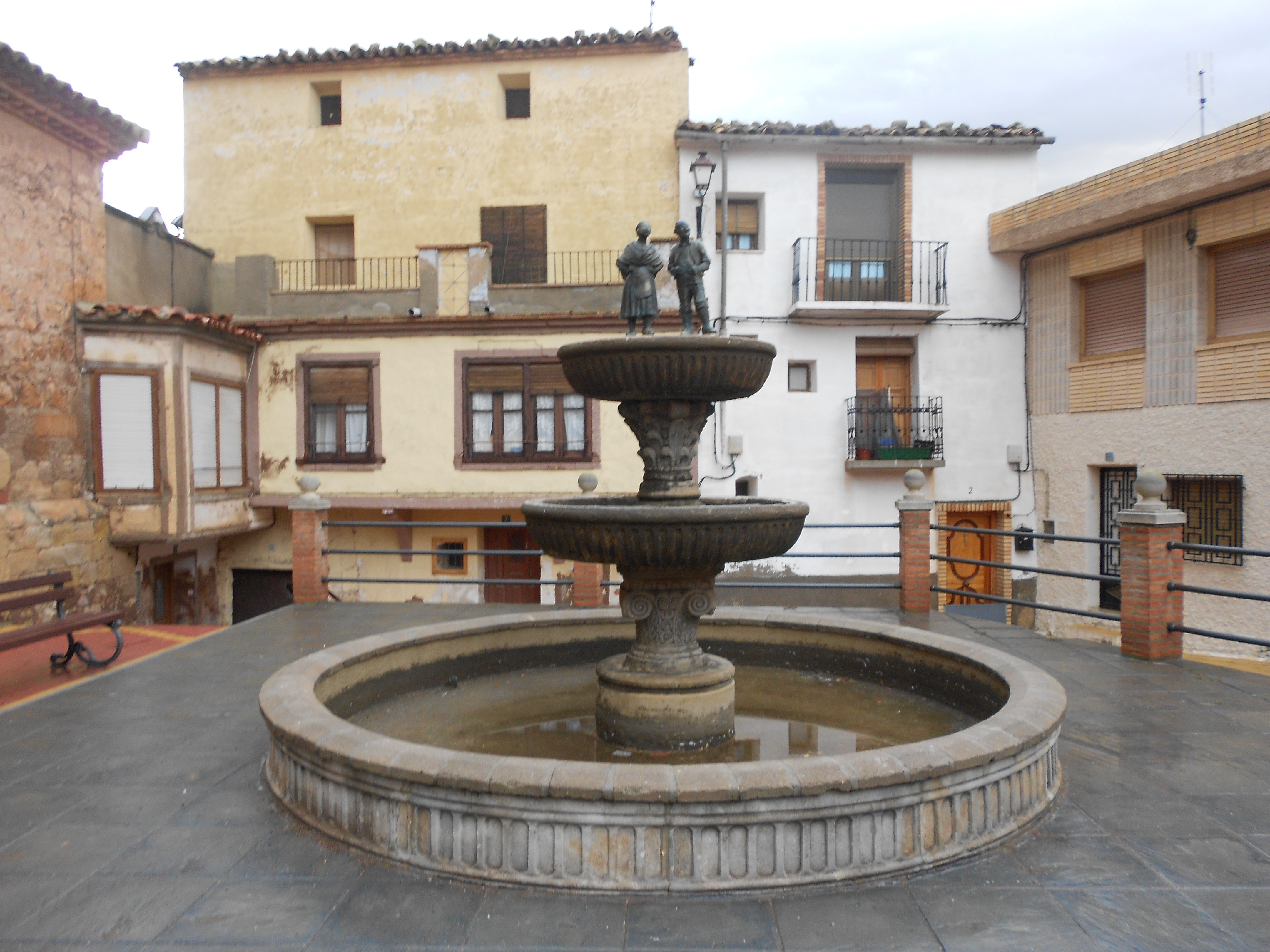 Monumento a los joteros (Fuendejalón, España). Inaugurado el 13 de mayo de 1995.